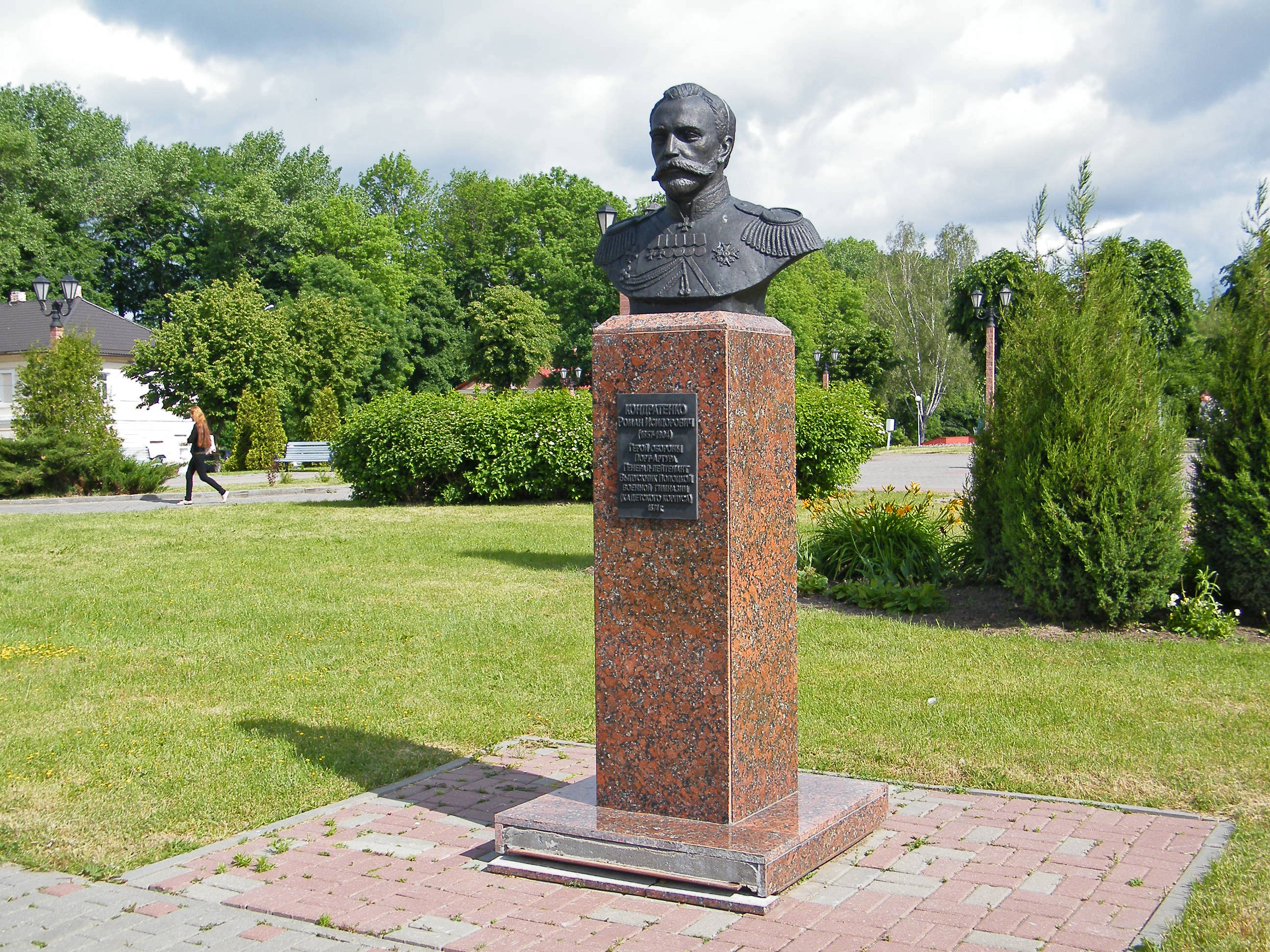 Бюст Романа Кондратенко